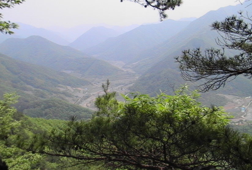 백제 금현성에서 본 광천과 성천의 합수머리